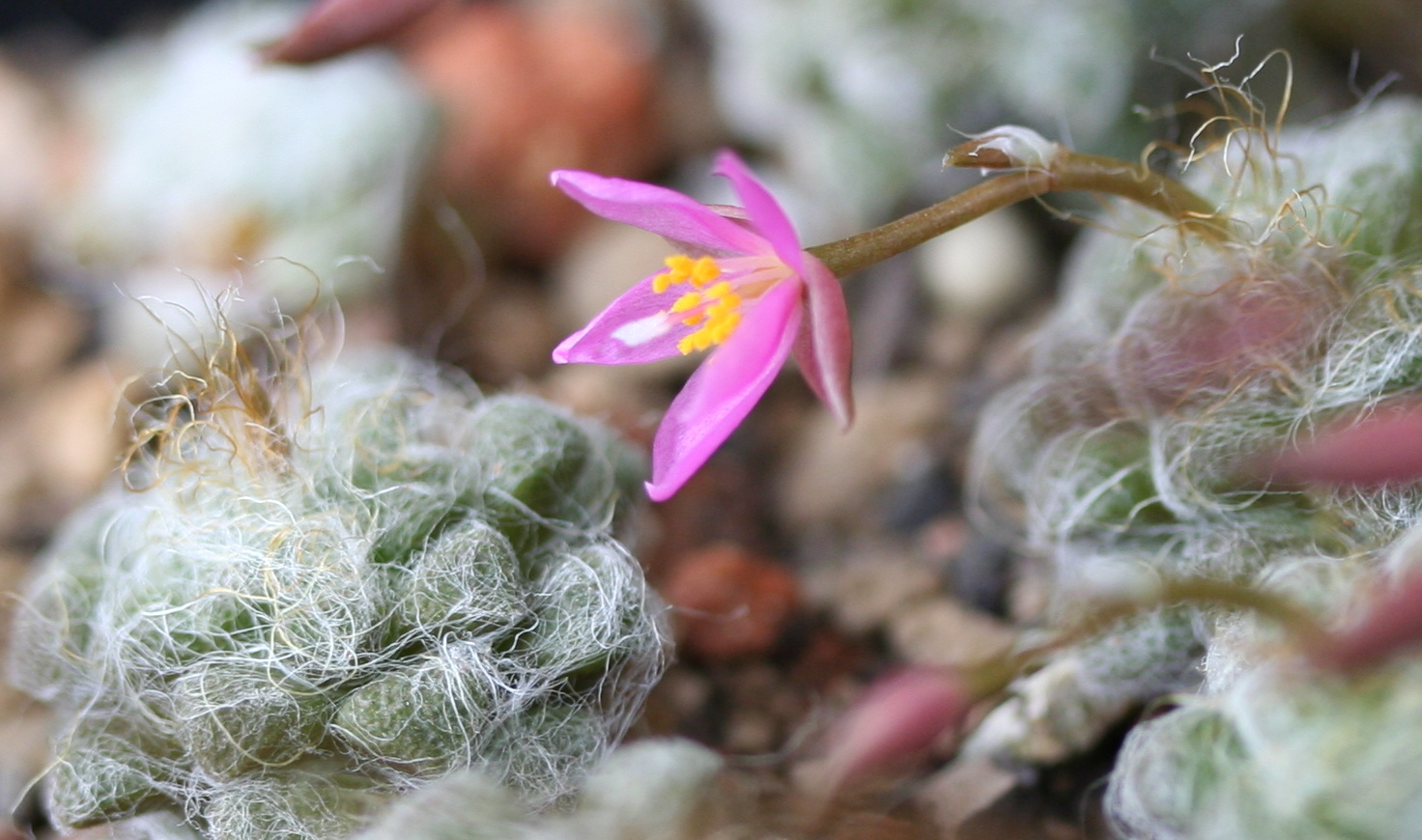 Blüte an Anacampseros namaquensis